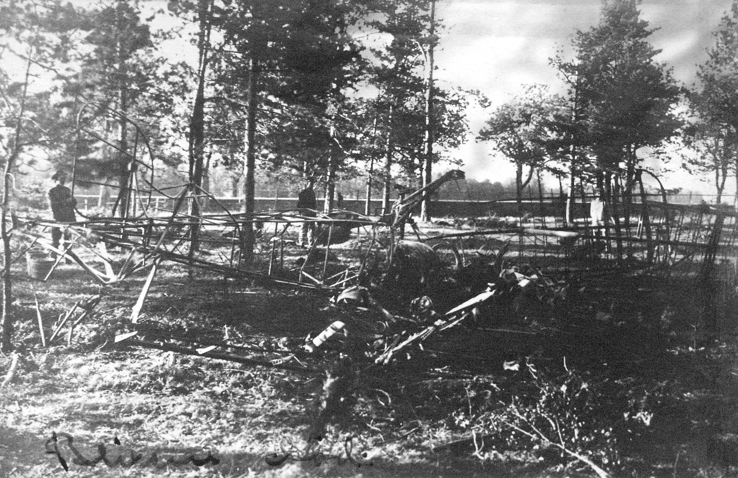 Hans Blixens flygplan på Ljungbyhed efter dödsstörtningen 1915.